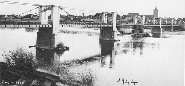 Jargeau, le pont suspendu. En août 1944, durant la Second Guerre mondiale, l'aviation alliée détruisait un câble suspenseur amont de la troisième travée rive droite. Les suspentes se trouvant libres en tête, tout l'ensemble du tablier bascula en pivotant autour de la suspension aval.